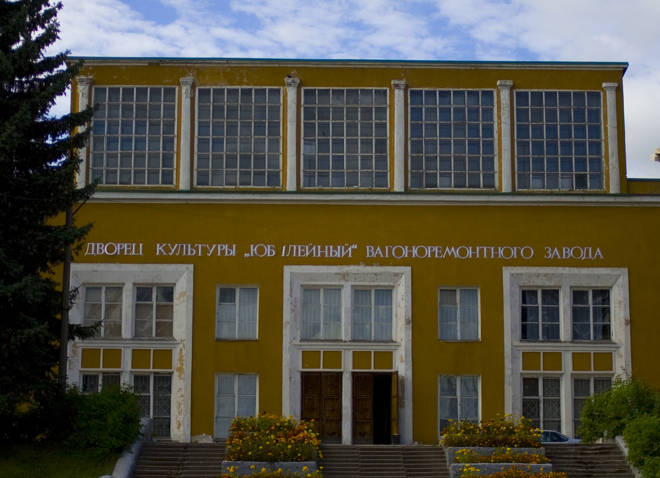 ДК "Юбилейный" в Рославле